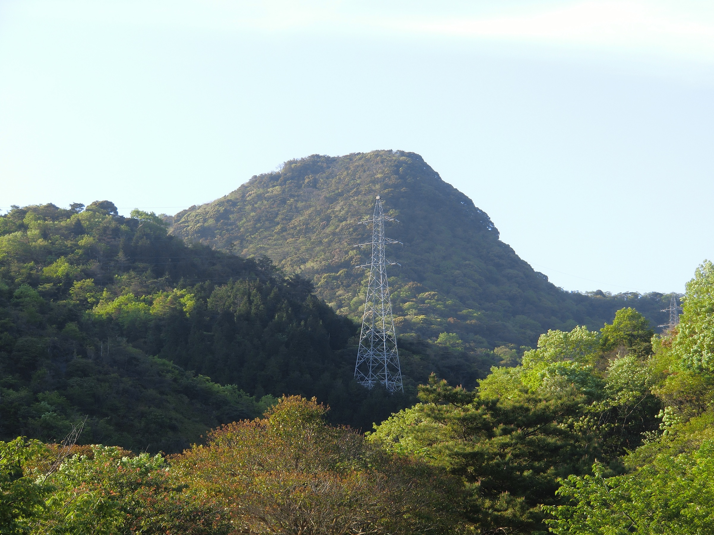 長門国・勝山の遠景（山口県下関市勝山）